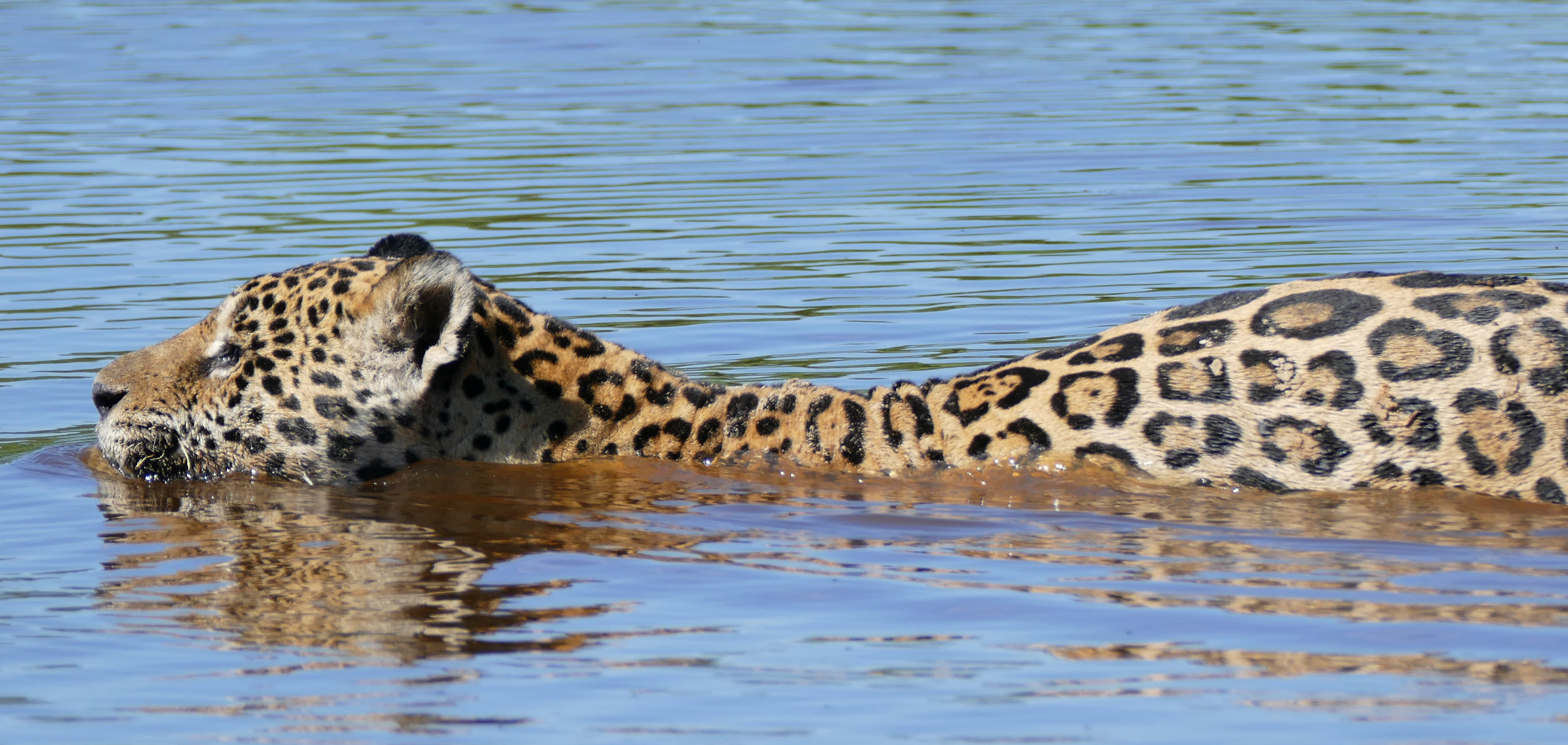 Cuiabá River, Porto Jofre, Poconé, Mato Grosso, BRAZIL